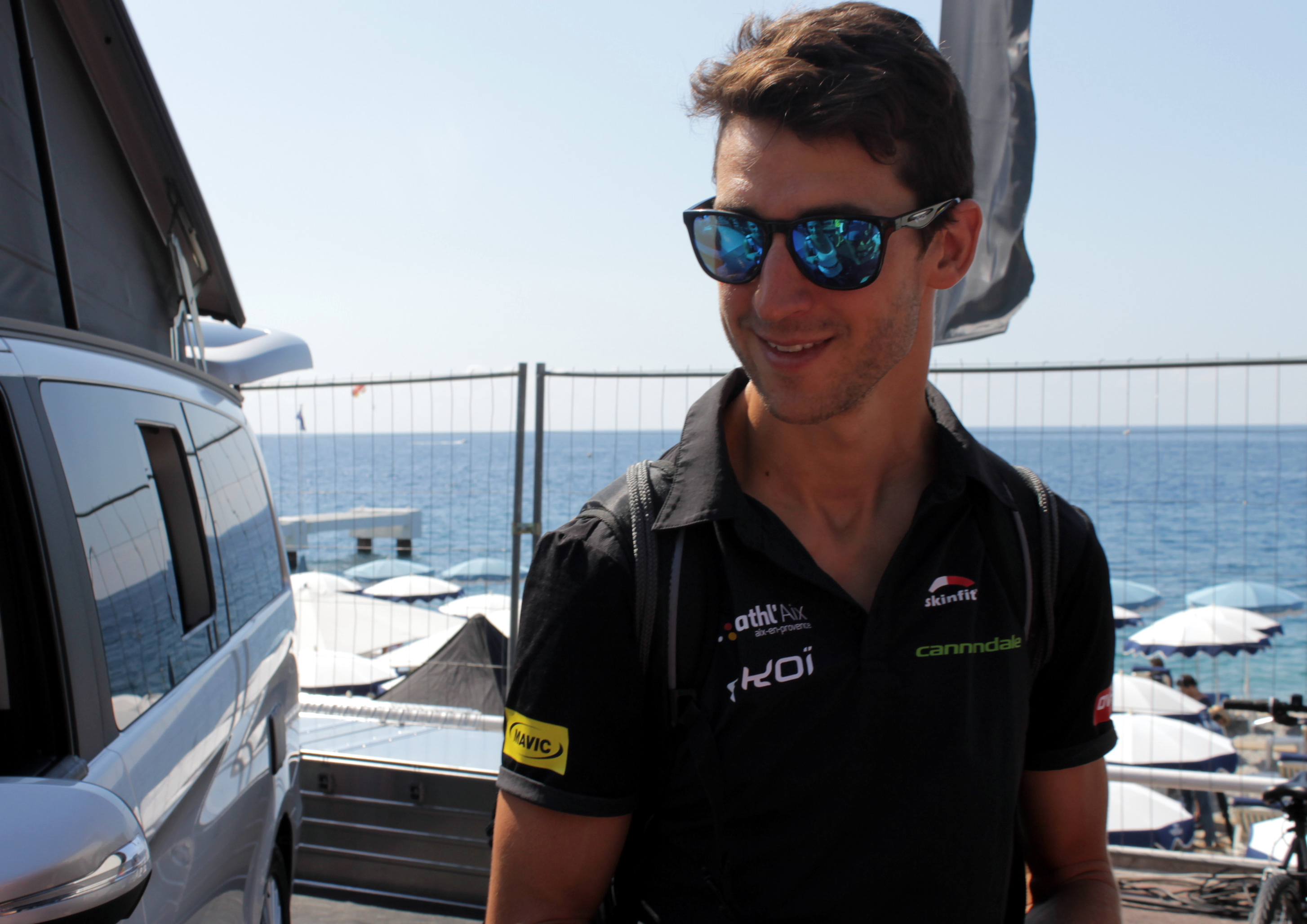 Ironman France . Nice 2015